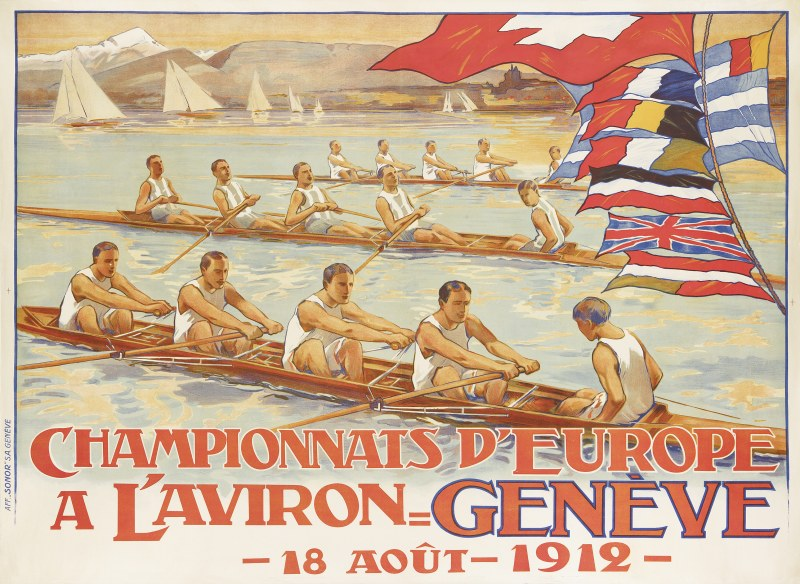 Affiche Championnat Europe aviron 1912